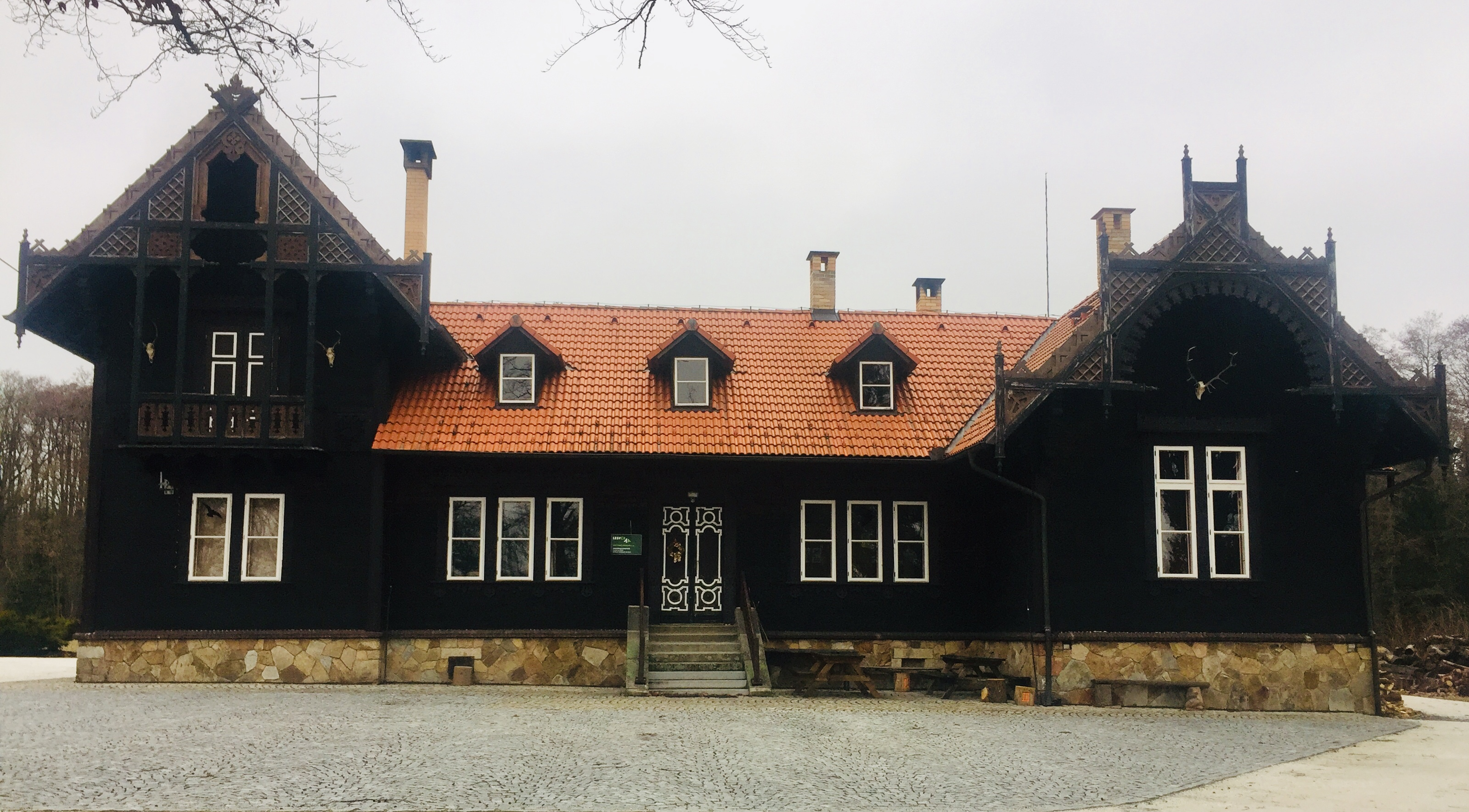 Vacíkov, část obce Hvožďany, okres Příbram, Česko, zámek